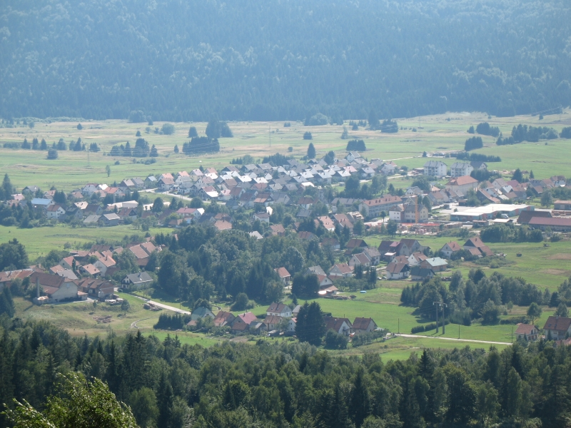 Pogled na Ravnu Goru